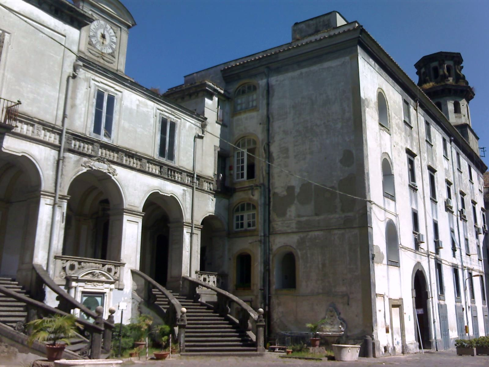 Complesso degli Incurabili di Napoli - La facciata della farmacia e di una delle chiese.